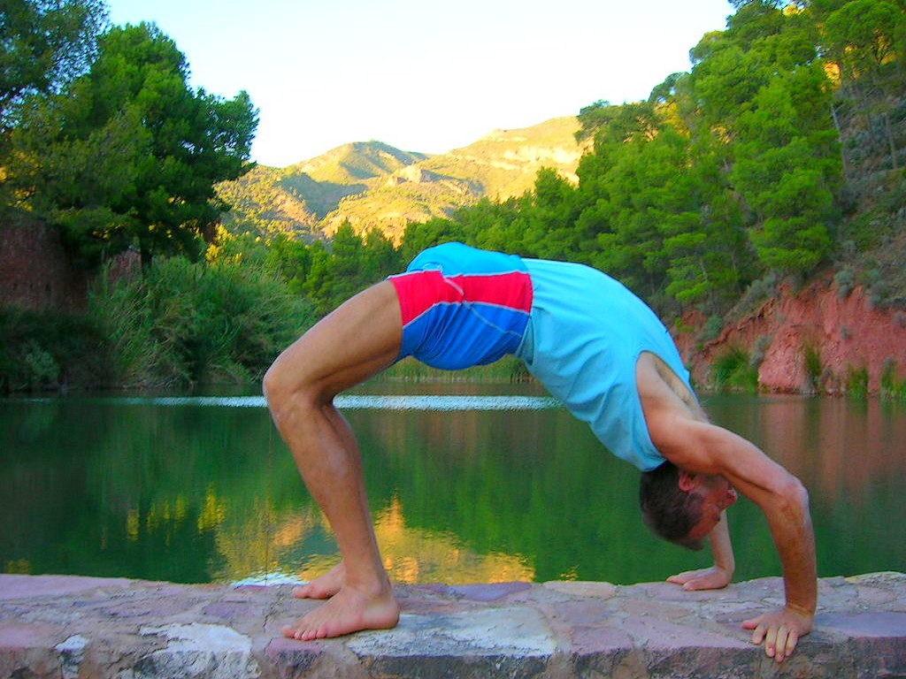 Yogui practicando el asana de La Rueda (Ūrdhva Dhanurāsana).